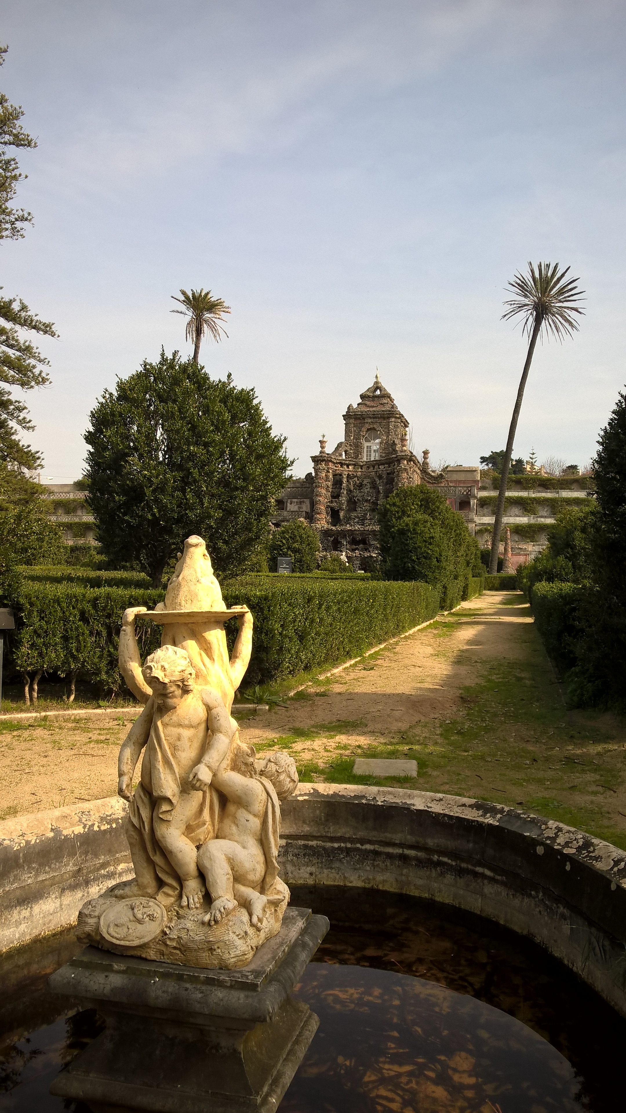 Quinta Real de Caxias (Oeiras)